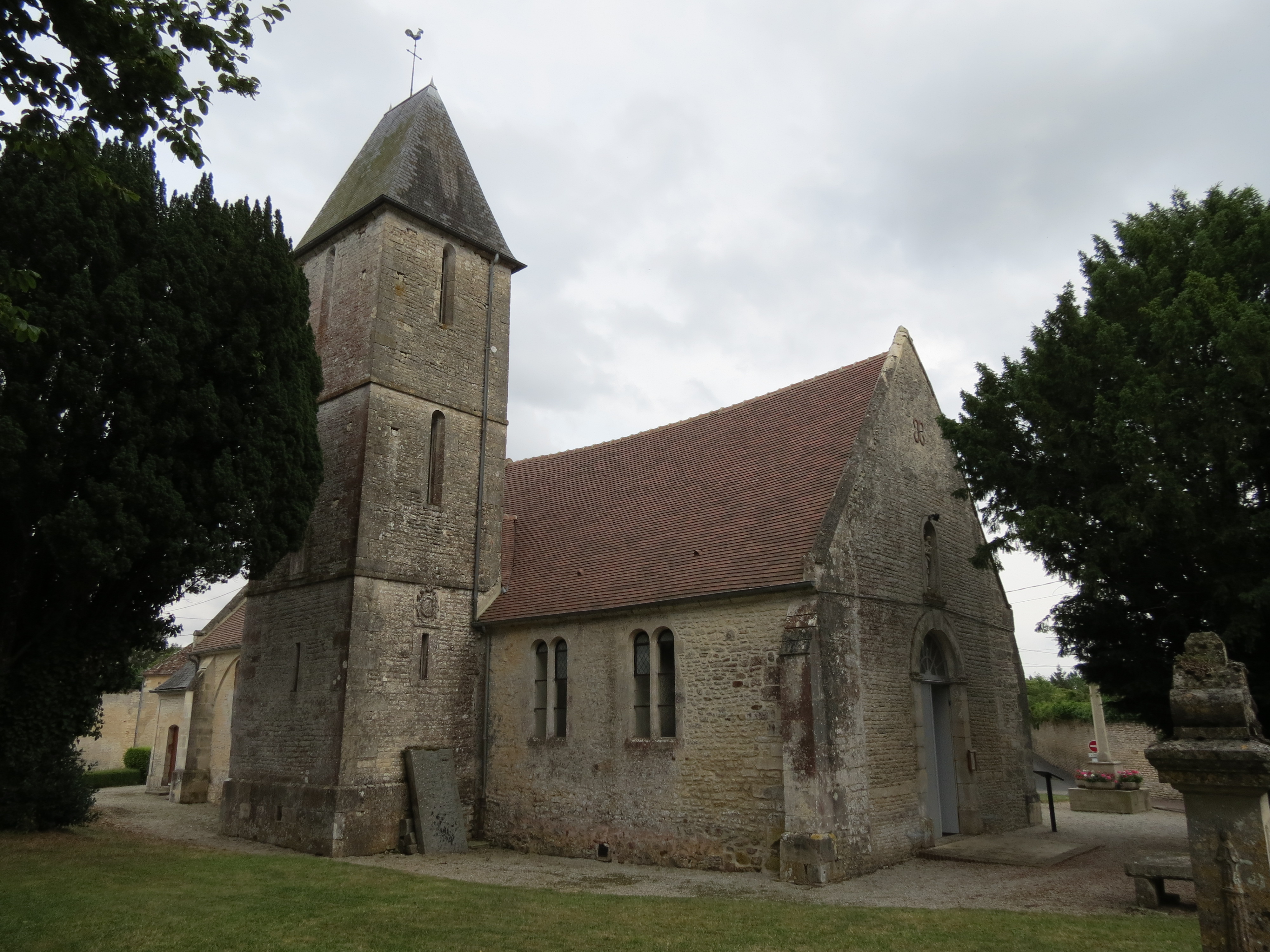 Église Notre-Dame-de-la-Visitation d'Aubigny.